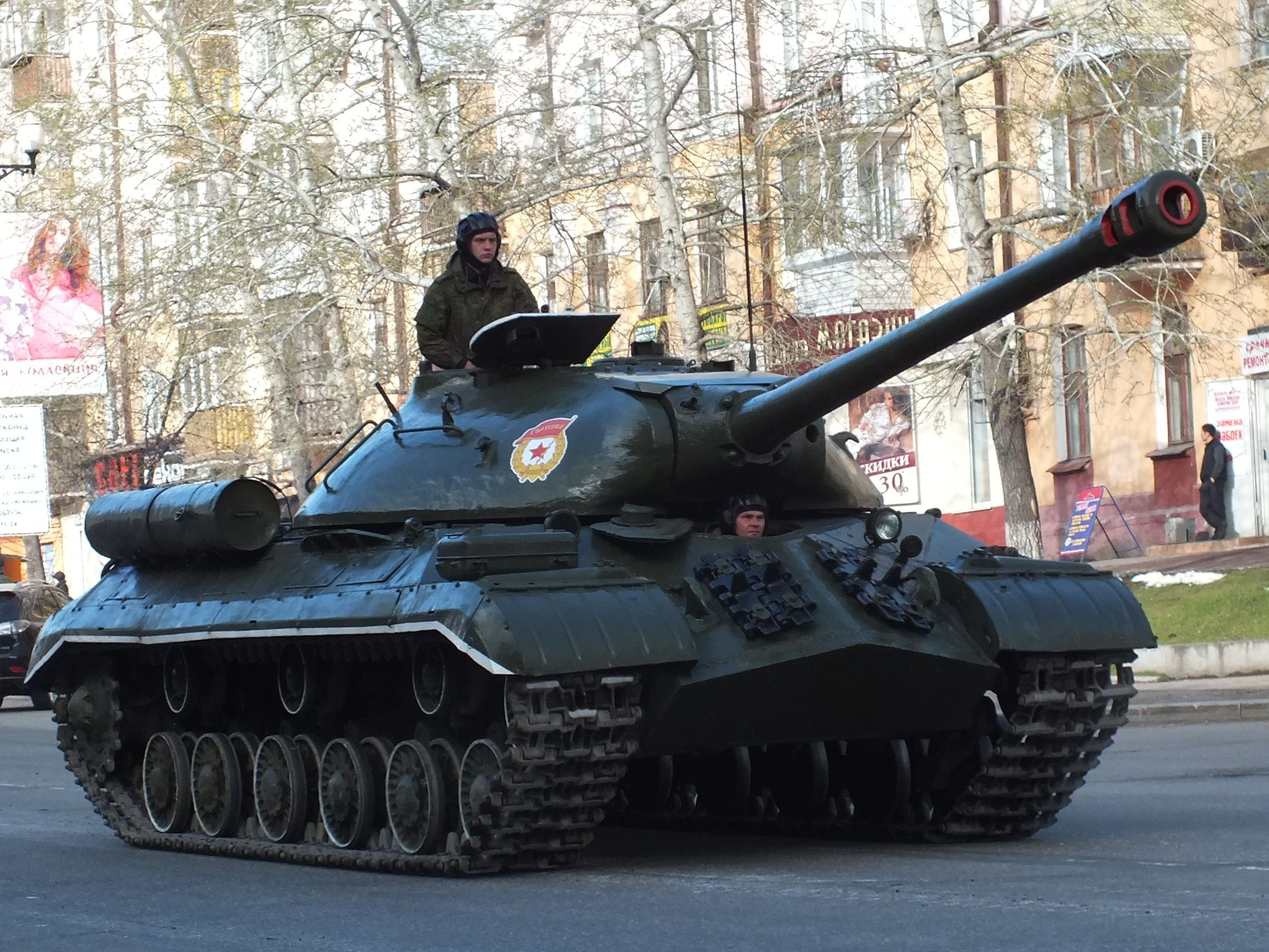 ИС-3 Хабаровск парад 9 мая 2015 года